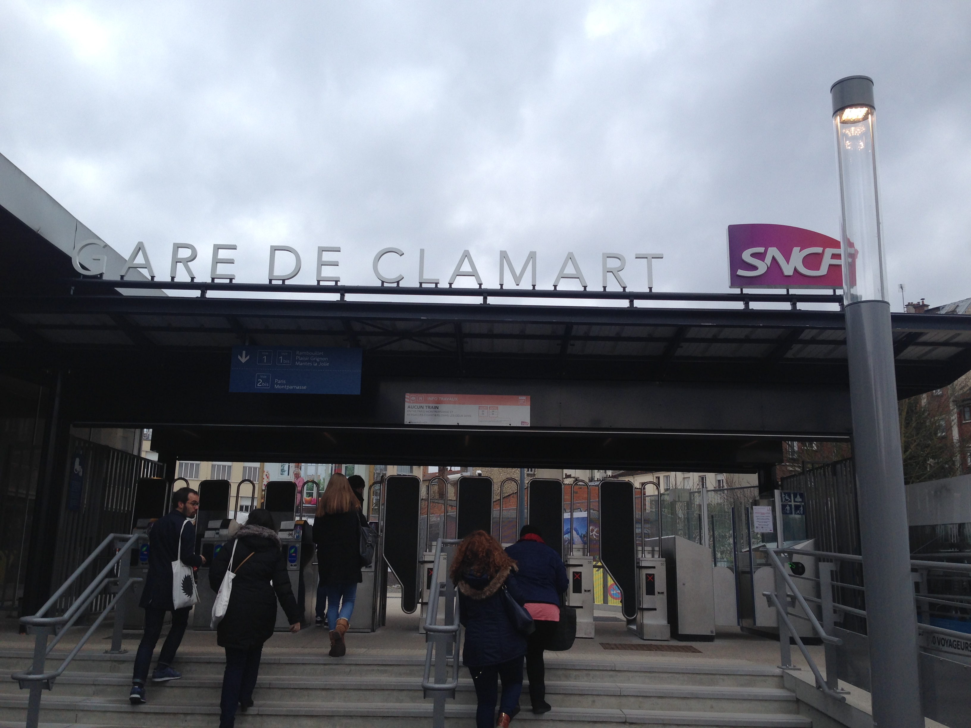 Entré de la gare de Clamart, en Mars 2017